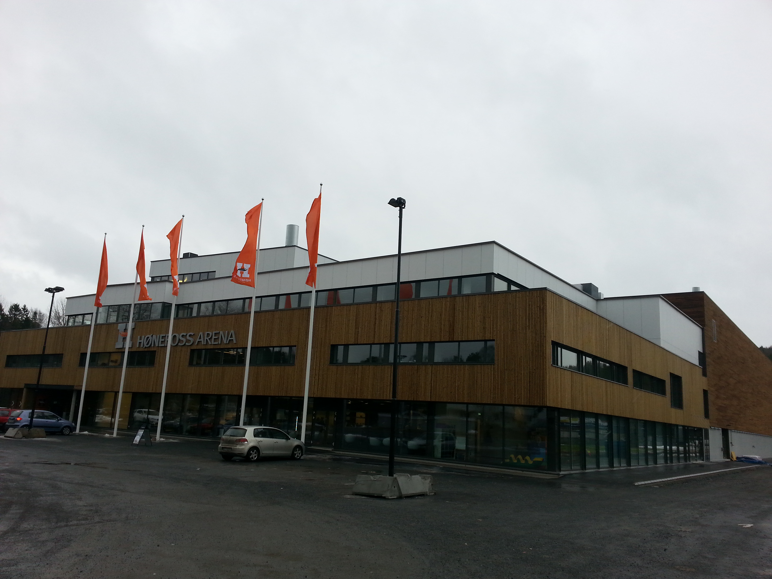 Hønefoss Arena, flerbrukshall på Hønefoss.